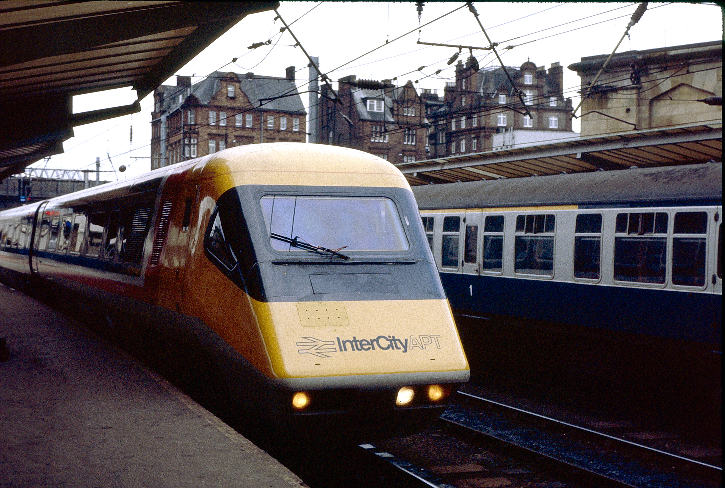 April 1983